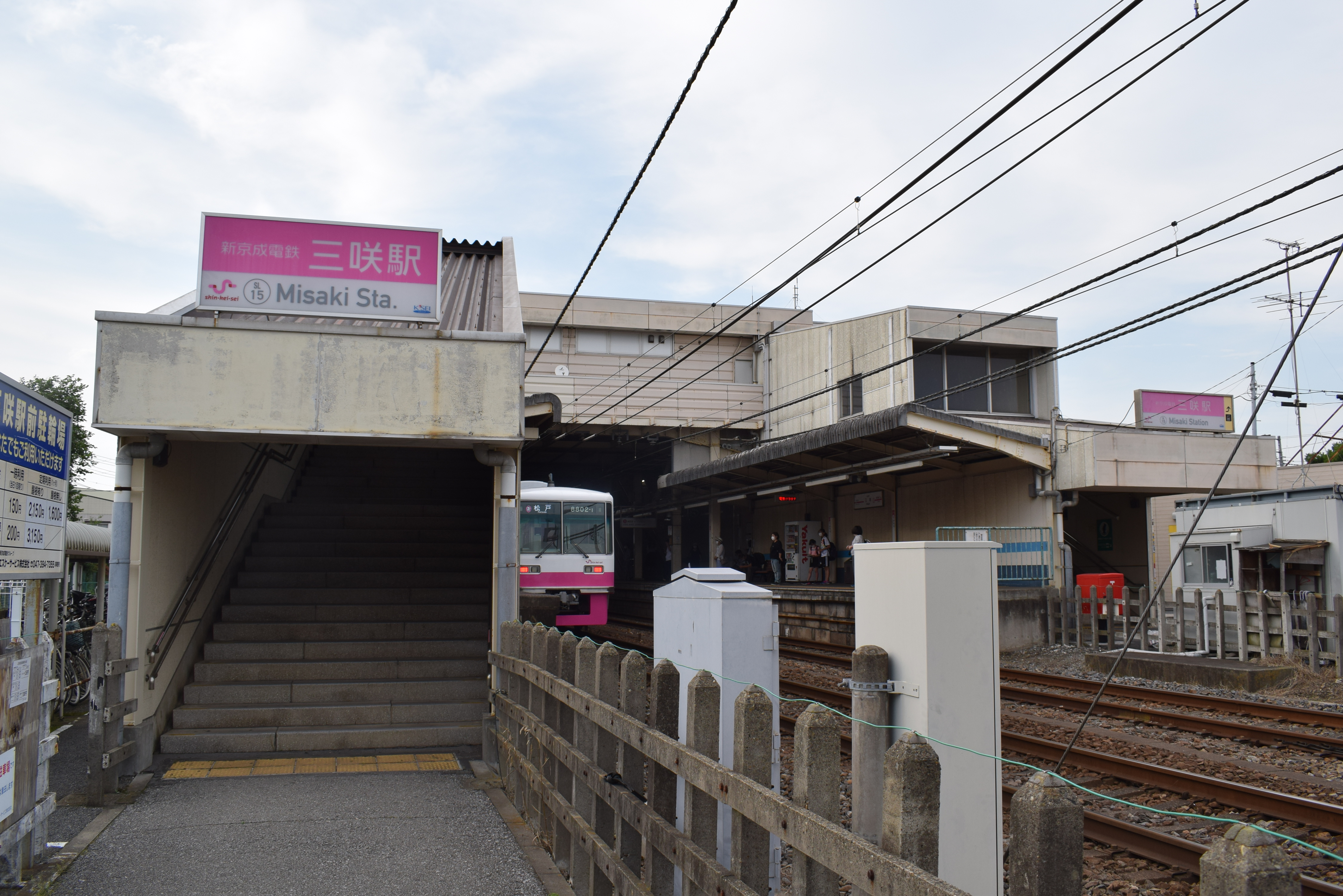 三咲駅駅舎